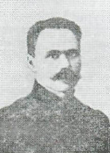 Николай Михайлович Немцов (1879—1937)